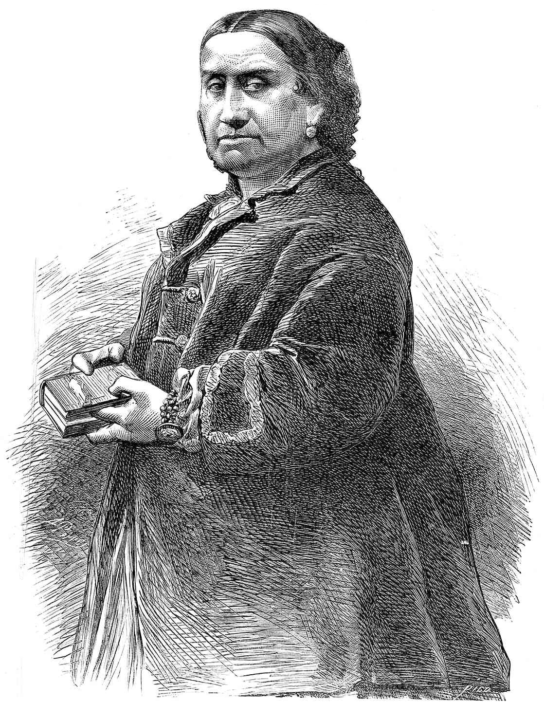 Retrato de Juana María de Vega, en la revista La Ilustración de Madrid.